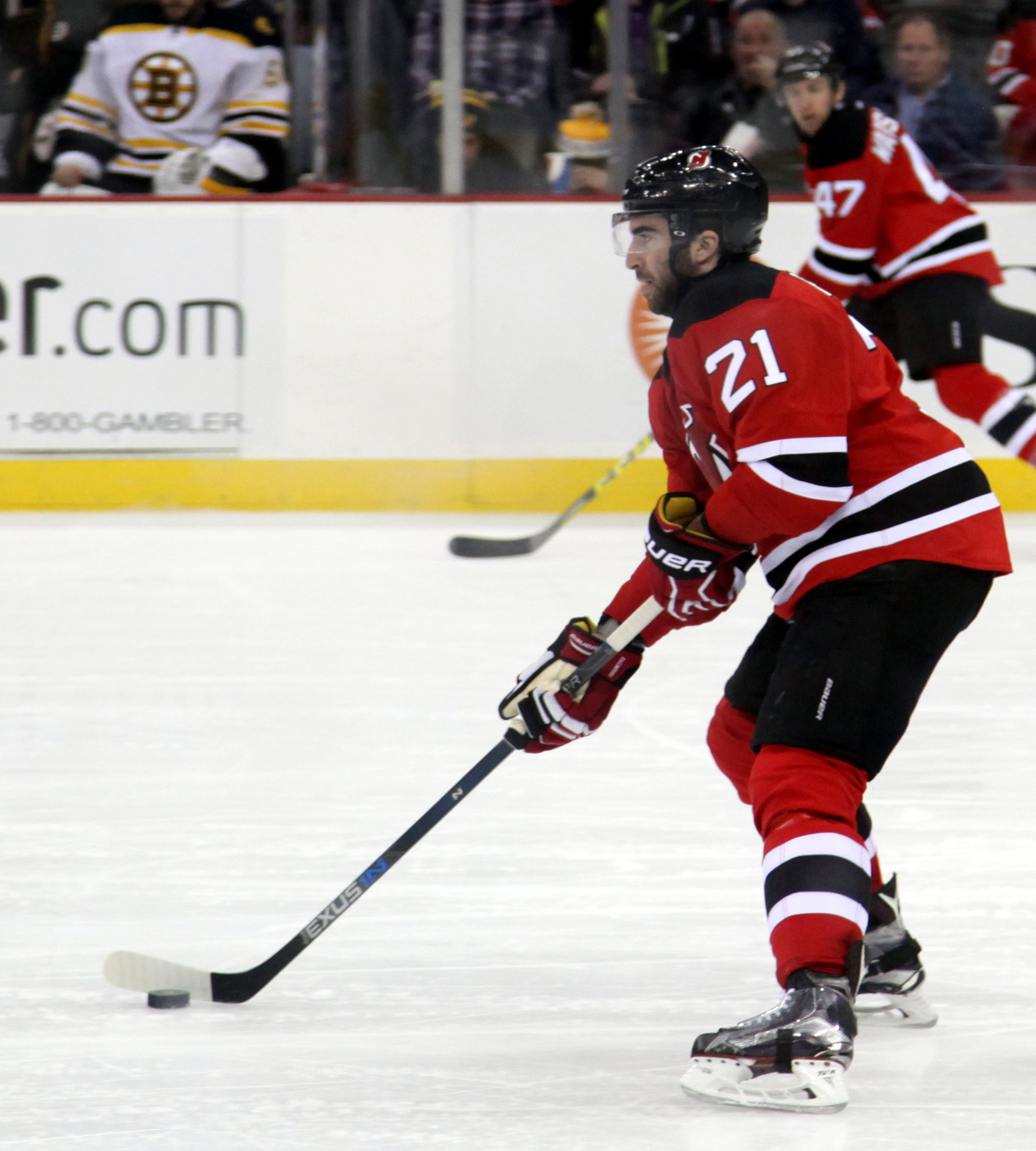 Kyle Palmieri in March 2016